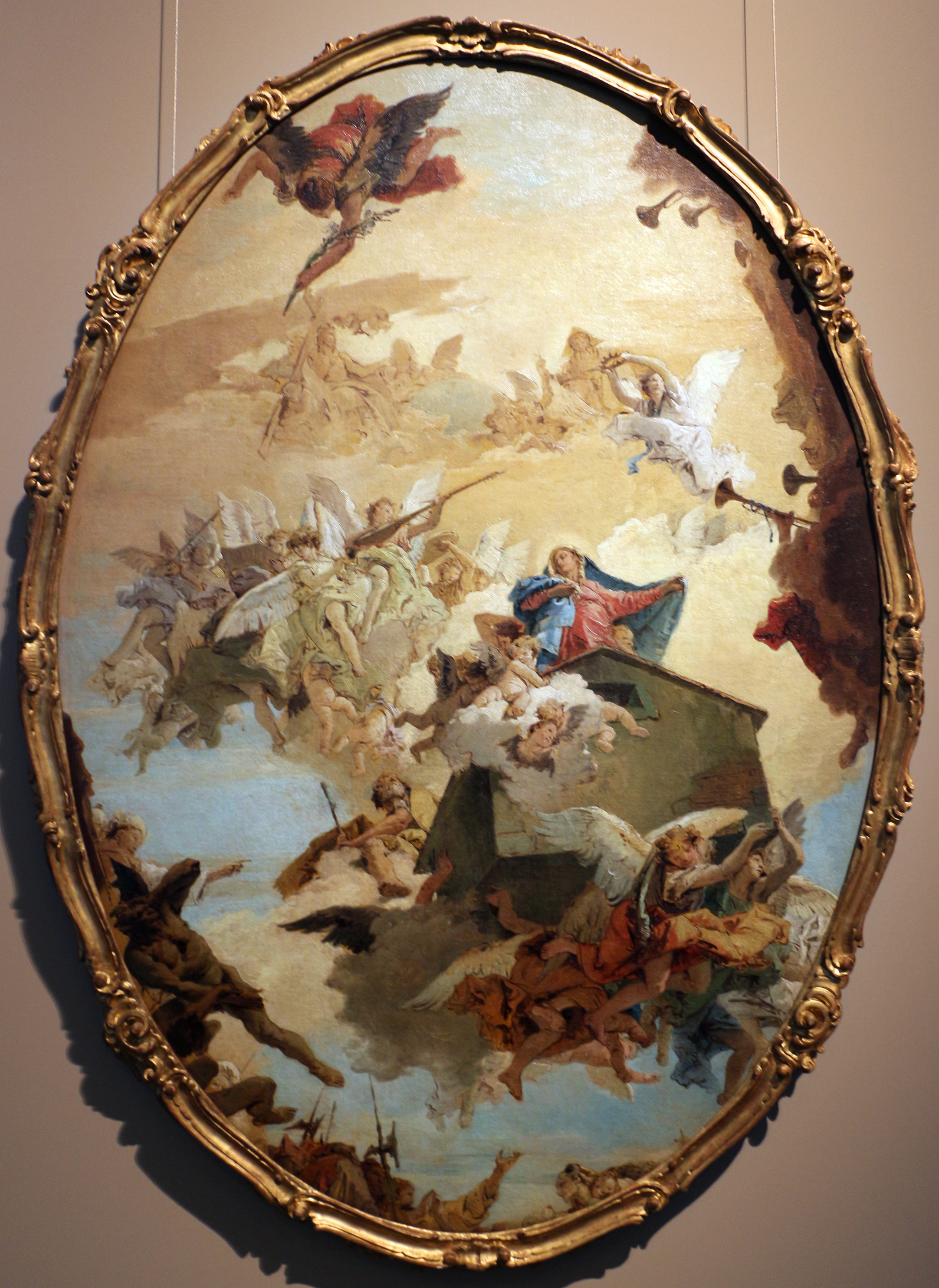 Gallerie dell'Accademia This is a photo of a monument which is part of cultural heritage of Italy.